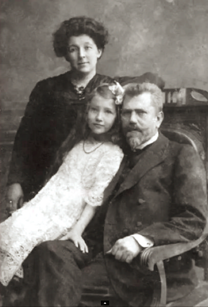 Гагенторн - семья учёных: Иван Эдуардович Гаген-Торн — известный российский хирург, профессор Императорской Военно-медицинской академии, его жена Вера Алек- сандровна, медсестра, окончила Петербугский университет, и дочь Нина Ивановна Гаген-Торн — этнограф, историк и поэтесса.